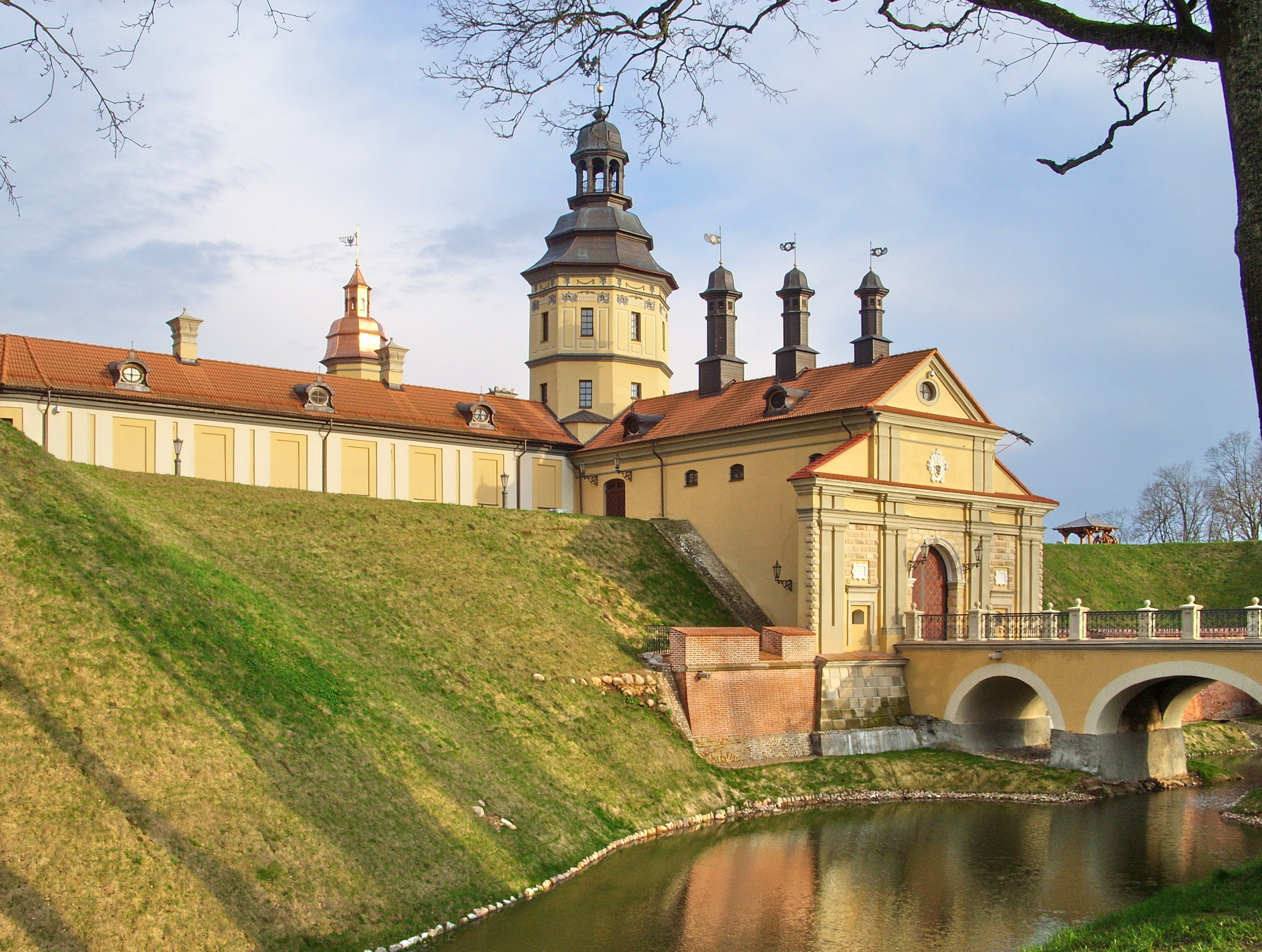 Беларуская (тарашкевіца): Палацава-паркавы ансамбль:замак-палац, паўднёвая і ўсходняя галерэі, камяніца, арсэнал з капліцай, брама, два прыбрамныя корпусы, паўночна-ўсходняя і паўднёва-заходняя галерэі, лядоўня, стайня;абарончыя збудаваньні і мост;тэрыторыя паркаў:Замкавы, Стары, Японскі, Ангельскі, Новы;водная сыстэма:Дзікі, Замкавы, Бэрнардынскі ставы. г. Нясьвіж This is a photo of Belarusian heritage monument. Reference number: 610Г000466 ( WLM)